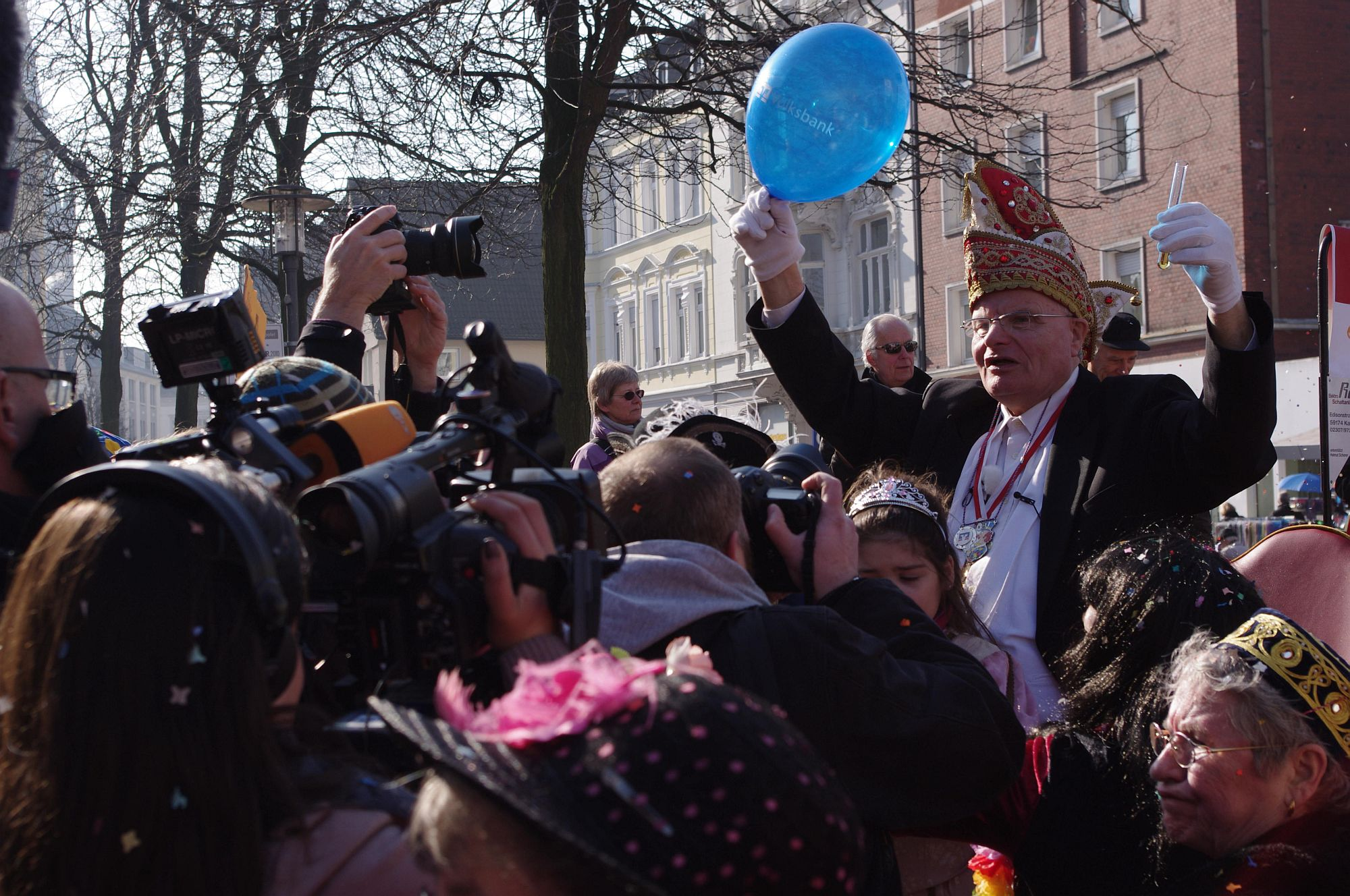 Helmut Scherer, weltkleinster Karnevalszug, Abschied nach 55 Jahren